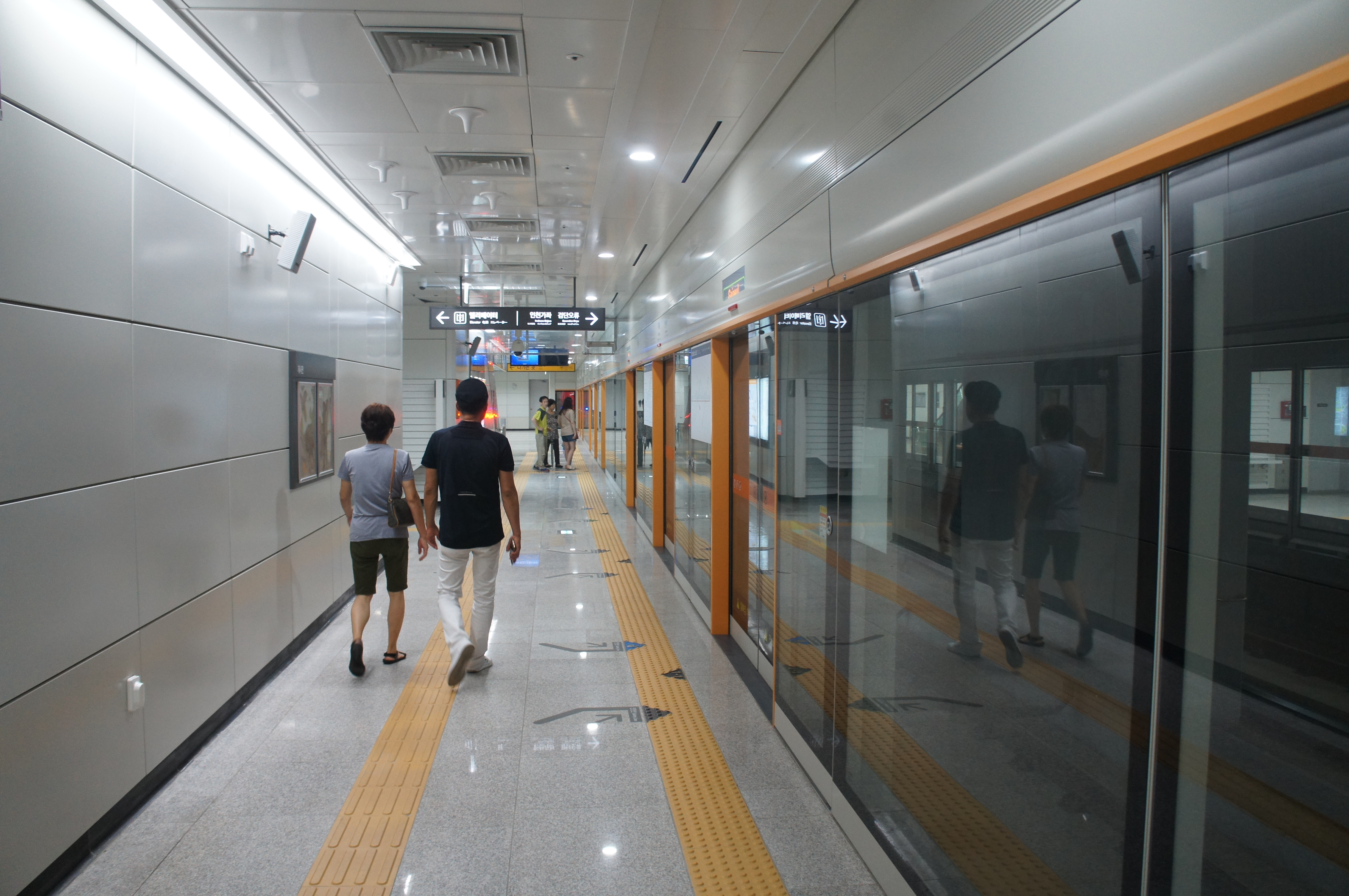 가재울역 승강장